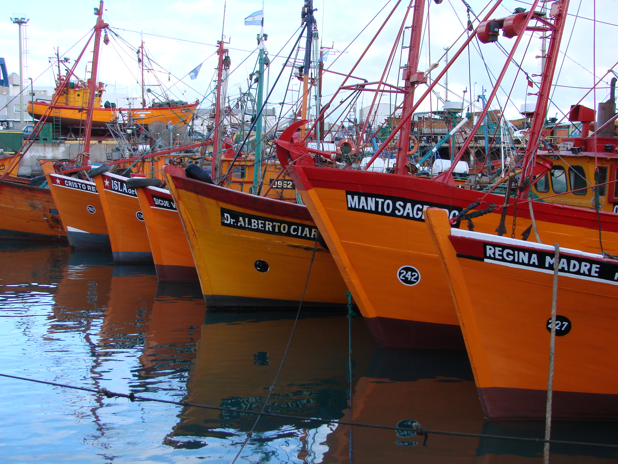 Mar del Plata, Argentina